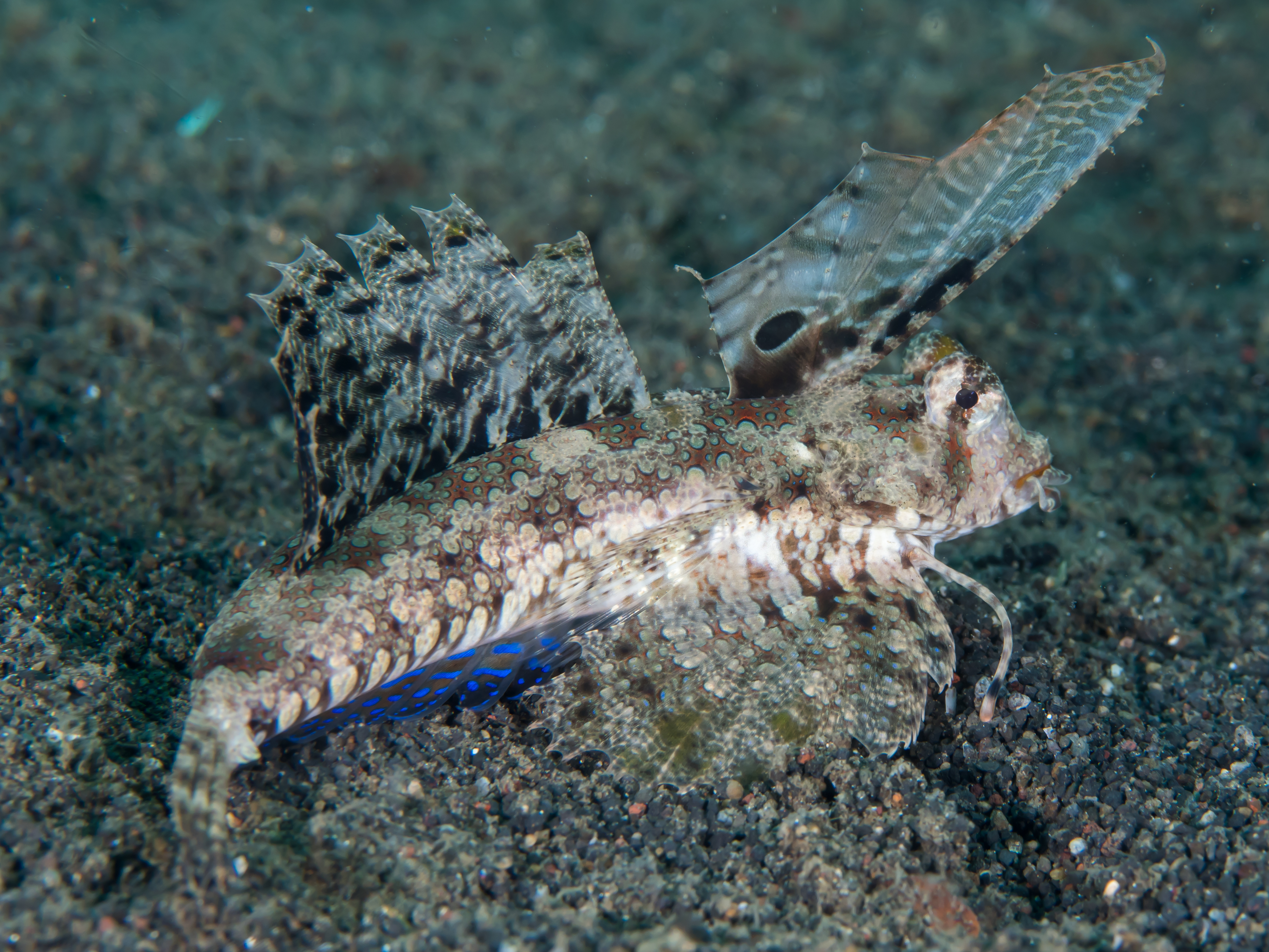 Lembeh, Indonesia - Orange-black dragonet (Dactylopus kuiteri)